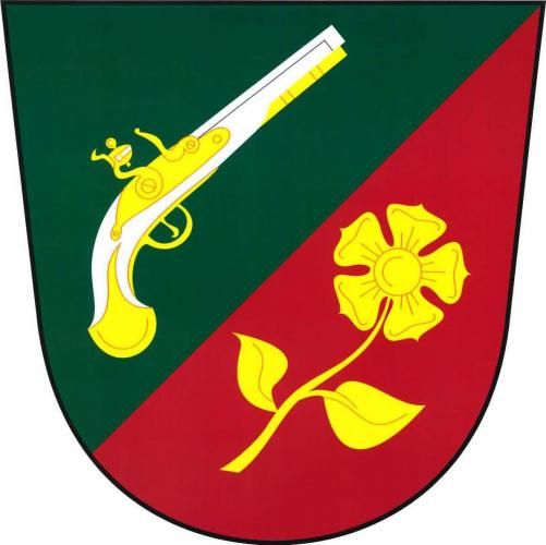 znak, Popůvky, okres Třebíč